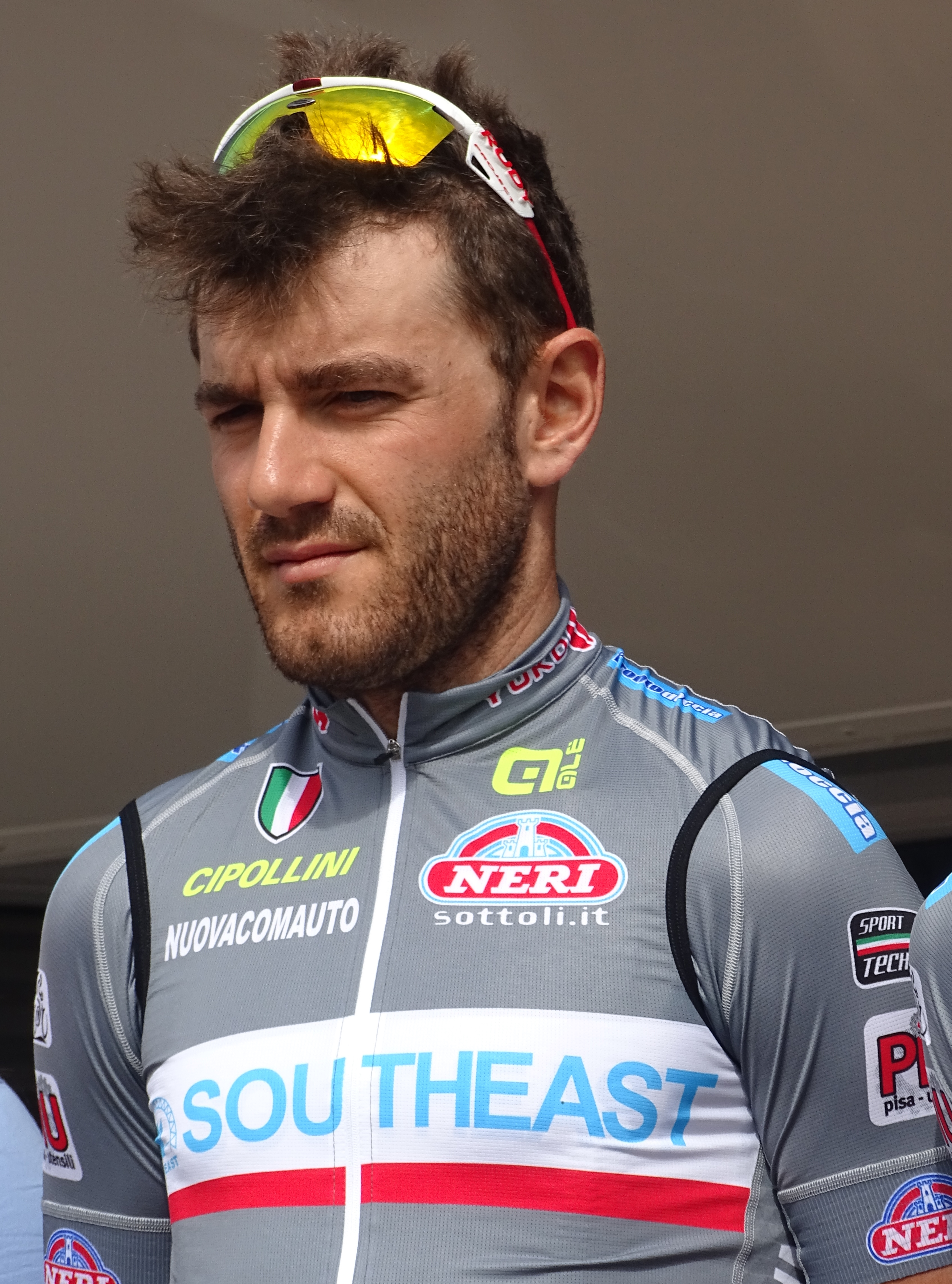 Reportage réalisé le jeudi 16 avril à l'occasion du départ et de l'arrivée du Grand Prix de Denain 2015 à Denain, Nord, Nord-Pas-de-Calais, France.